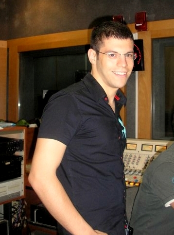 מתן חודורוב, הכתב הכלכלי של גלי-צה"ל.